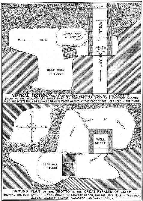 la grotte dans la pyramide de Khéops